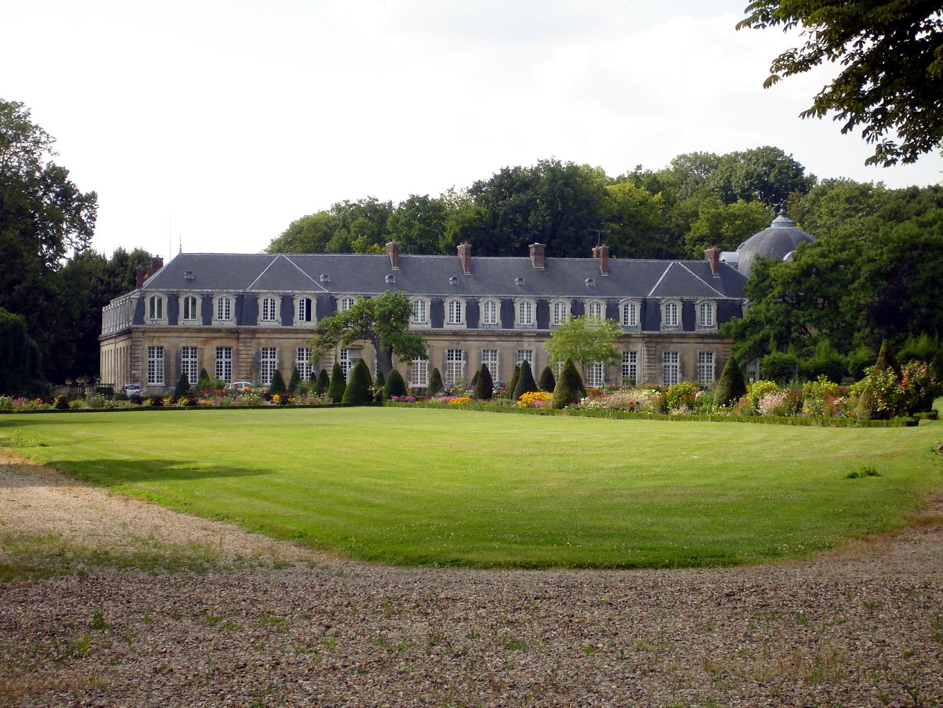 Le château d'Arnouville-lès-Gonesse (Val-d'Oise), France